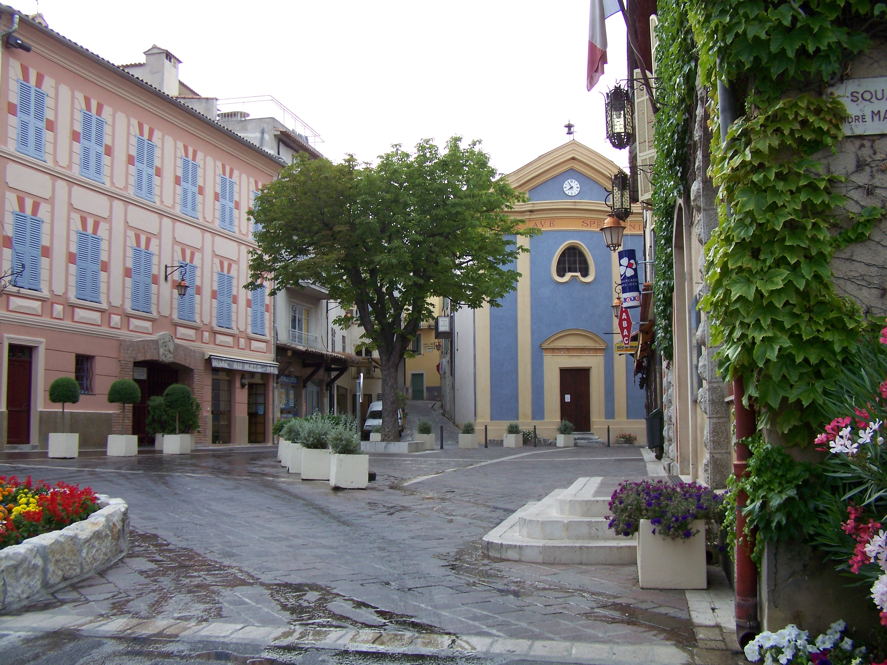 Place du village de Levens (Alpes-Maritimes, France), nommée "Place de la République". Le bâtiment peint en bleu est la chapelle de la confrérie des pénitents blancs